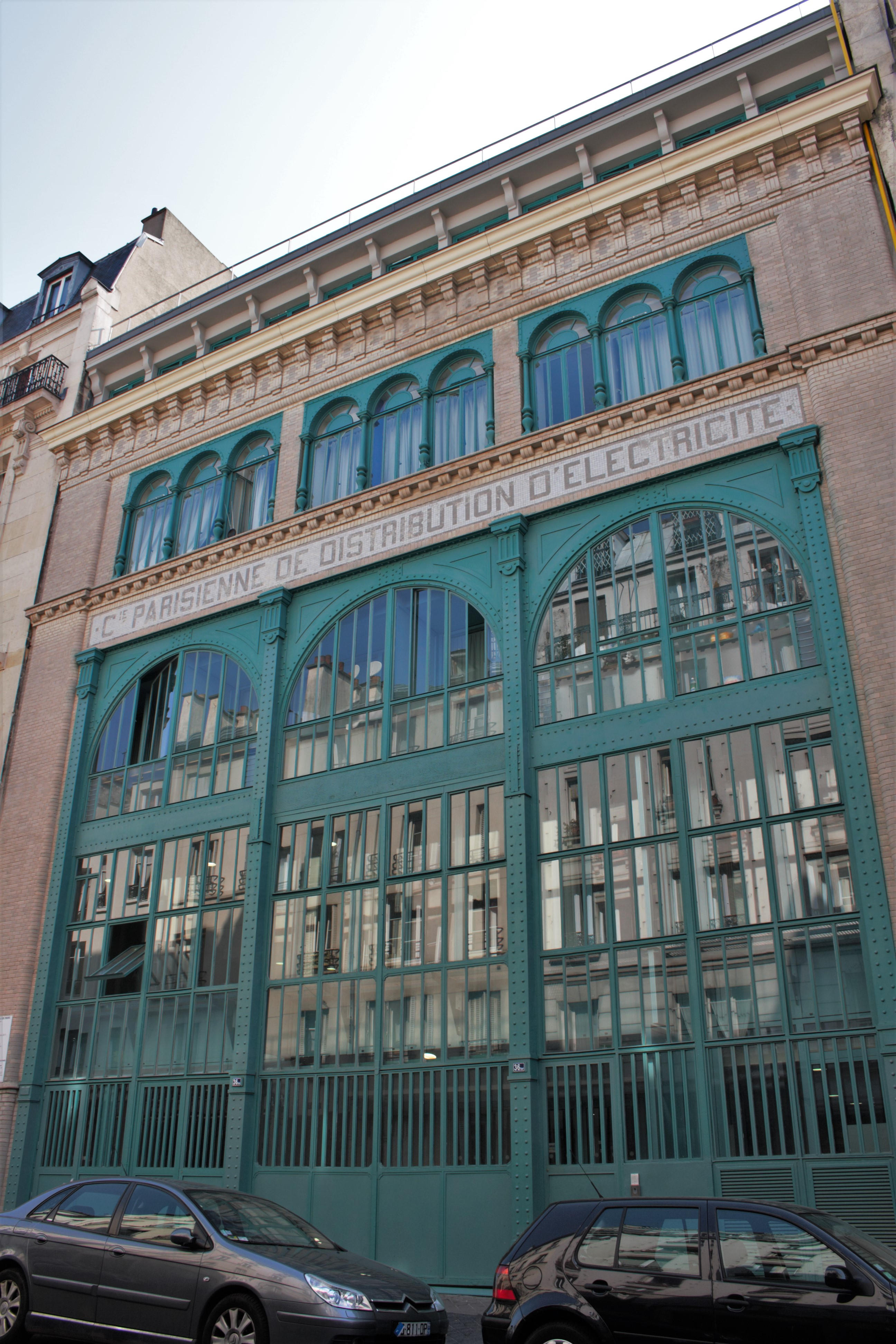 Sous-station Temple in der Rue Jacques-Louvel-Tessier Nr. 36 im 10. Arrondissement in Paris (Île-de-France/Frankreich)